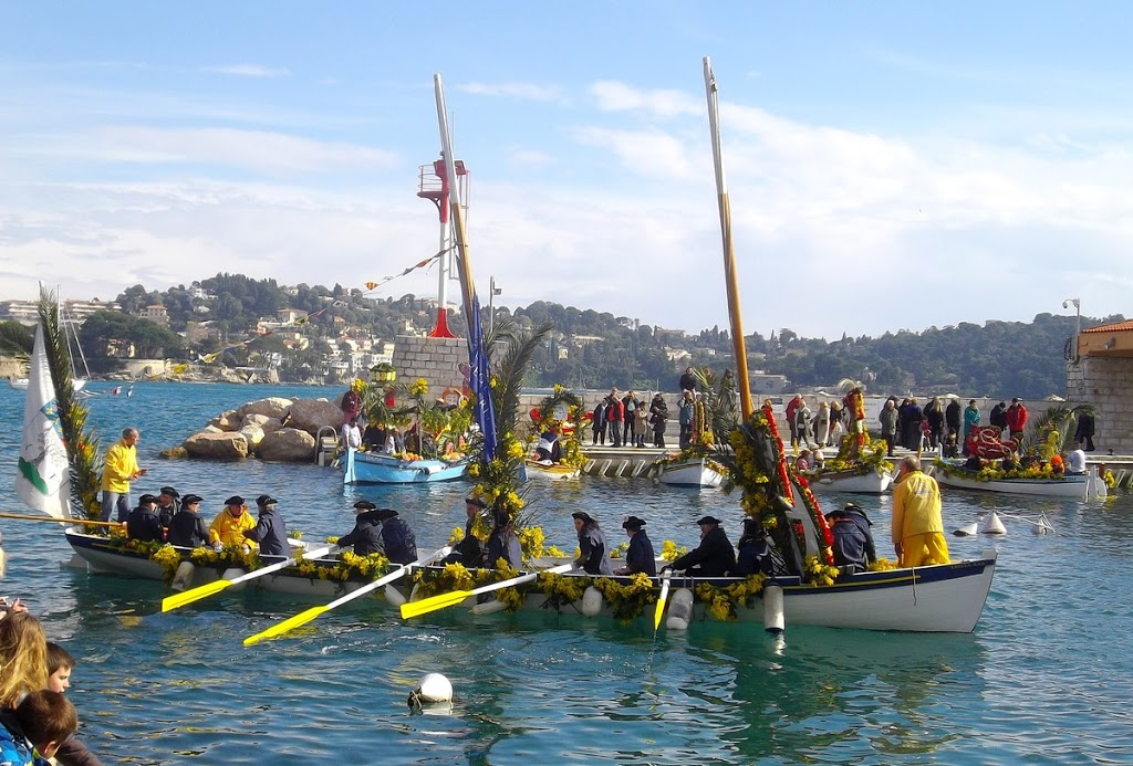 La yole de Bantry "Laïssa Ana" au Combat naval fleuri de Villefranche-sur-Mer 2013